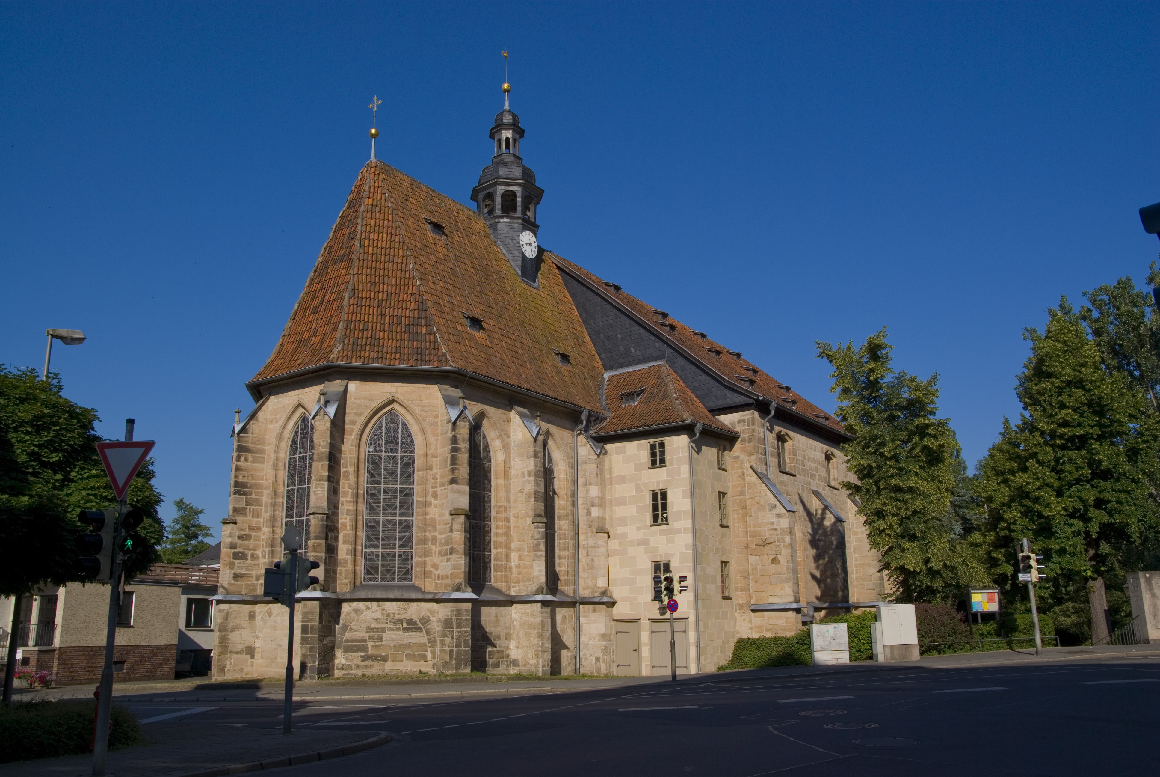 Die Heiligkreuzkirche in Coburg, Bayern